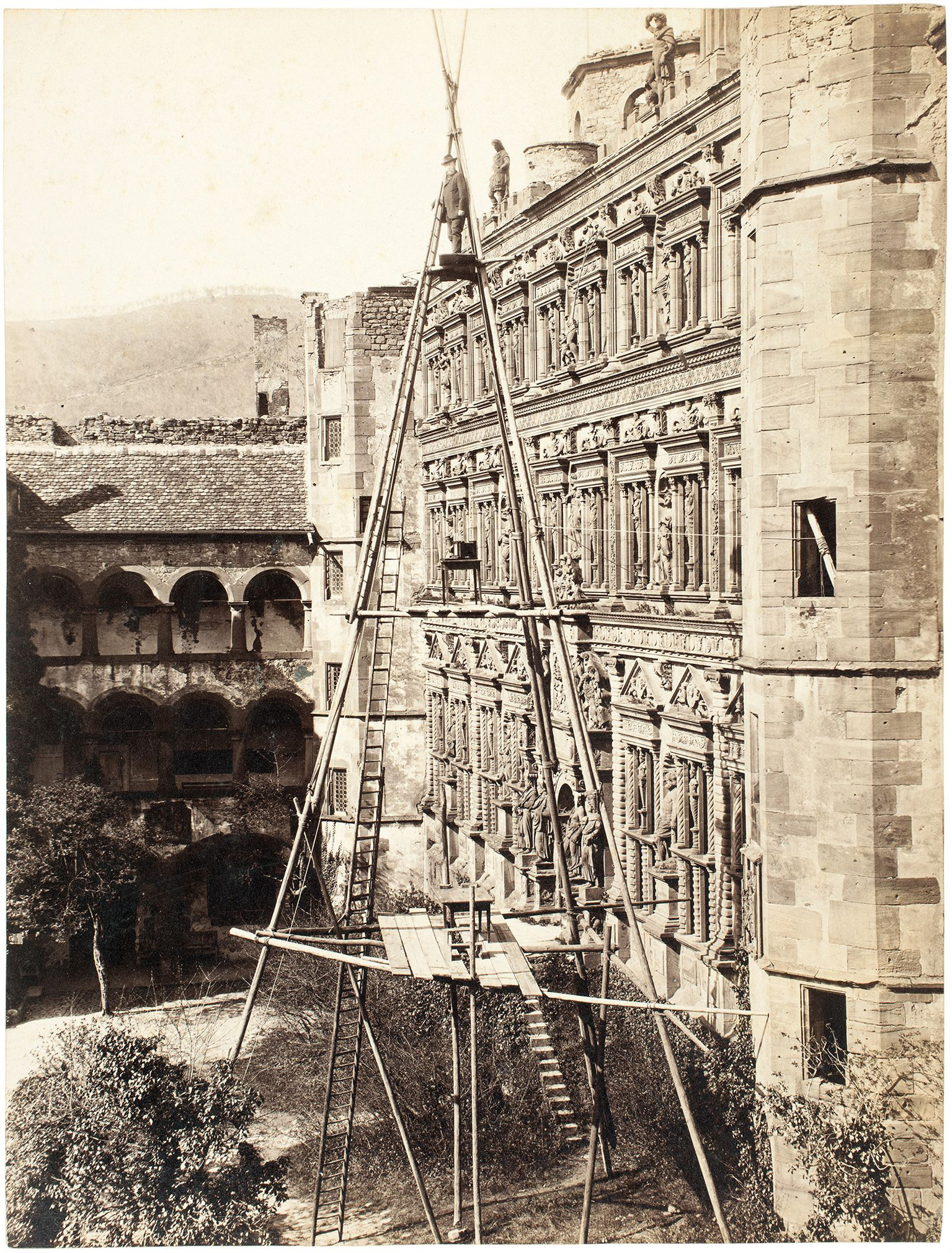 Franz Richard auf seinem Kamerapodest vor der Fassade des Ottoheinrichsbaus, Heidelberg, vor 1864 Albuminpapier